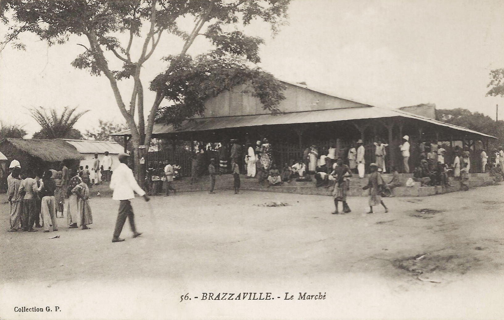 Brazaville. Le marché. collection G.P.